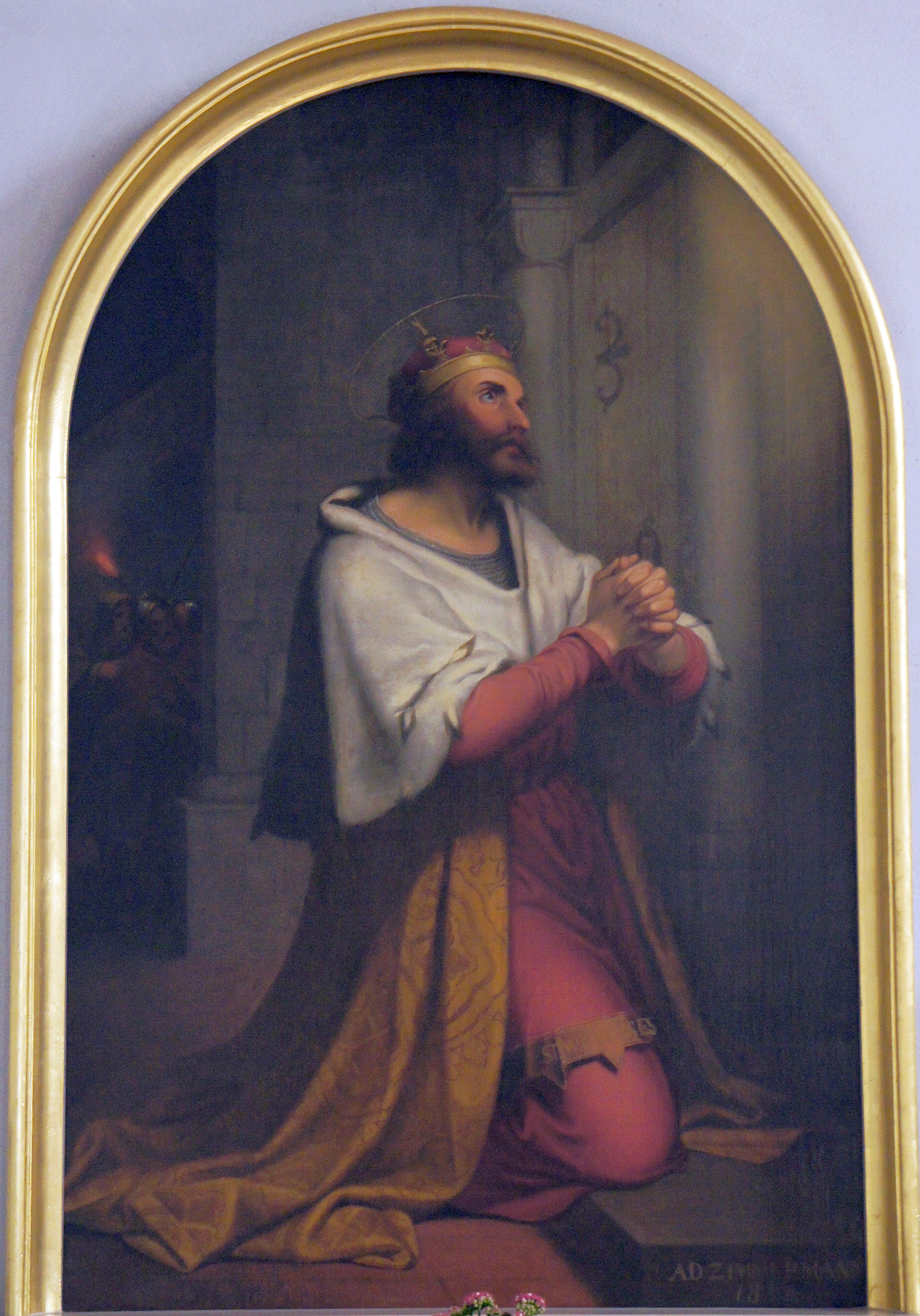 Der heilige Wenzeslaus. Altarbild in der katholischen Kirche zum heiligen Kreuz in Görlitz